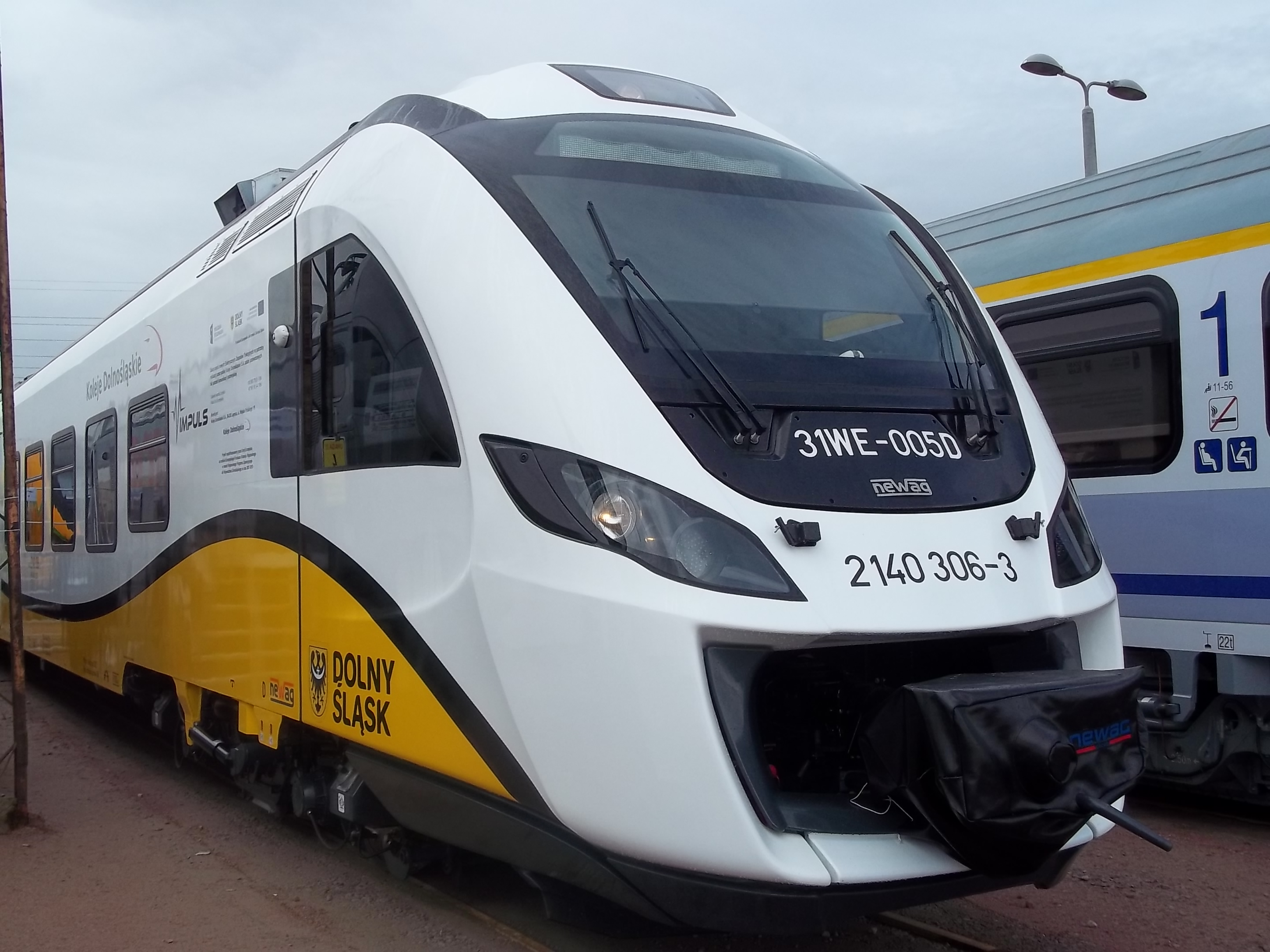 Elektryczny Zespół Trakcyjny typu 31WE "Impuls", wyprodukowany przez Grupę NEWAG.